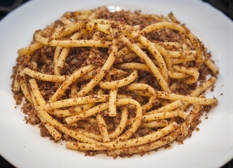 Макароны «по-флотски» из отварного мяса. Часто применялись в общепите